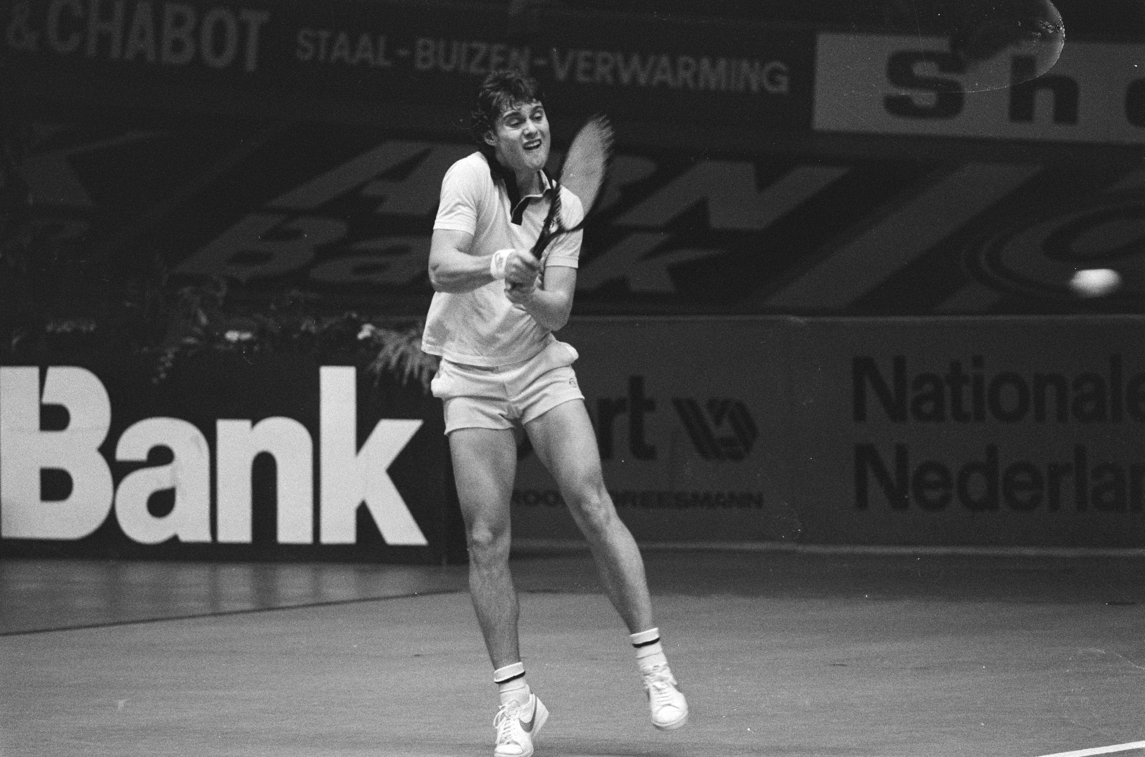 Collectie / Archief : Fotocollectie Anefo Reportage / Serie : ABN Tennistoernooi, Rotterdam Beschrijving : Gene Mayer in aktie Datum : 4 april 1979 Locatie : Rotterdam, Zuid-Holland Trefwoorden : sport, tennis, toernooien Persoonsnaam : Mayer, Gene Fotograaf : Bogaerts, Rob / Anefo Auteursrechthebbende : Nationaal Archief Materiaalsoort : Negatief (zwart/wit) Nummer archiefinventaris : bekijk toegang 2.24.01.05 Bestanddeelnummer : 930-1996